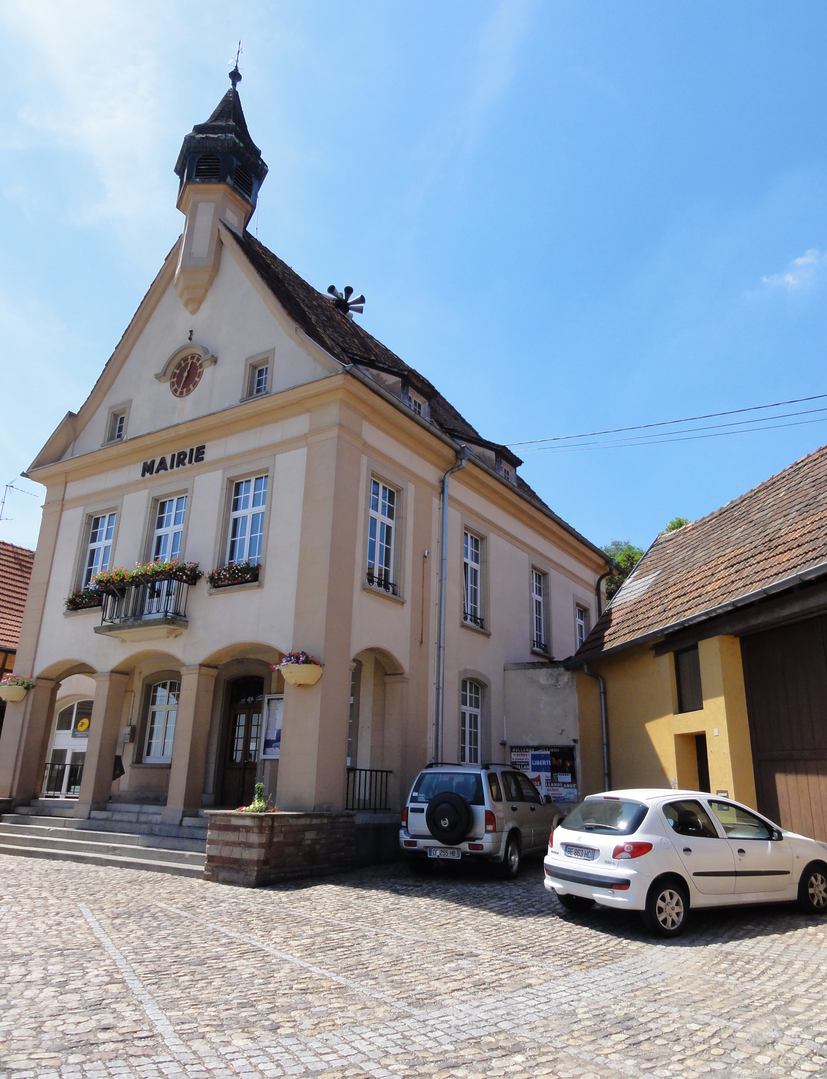 Alsace, Bas-Rhin, Kurtzenhouse, Mairie (1926), 29 rue Principale: .